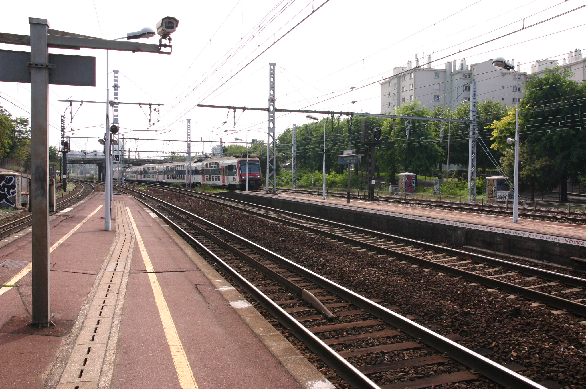 La Gare de Maisons-Alfort - Alfortville, Gare de Maisons-Alfort / Alfortville, département du Val-de-Marne, France